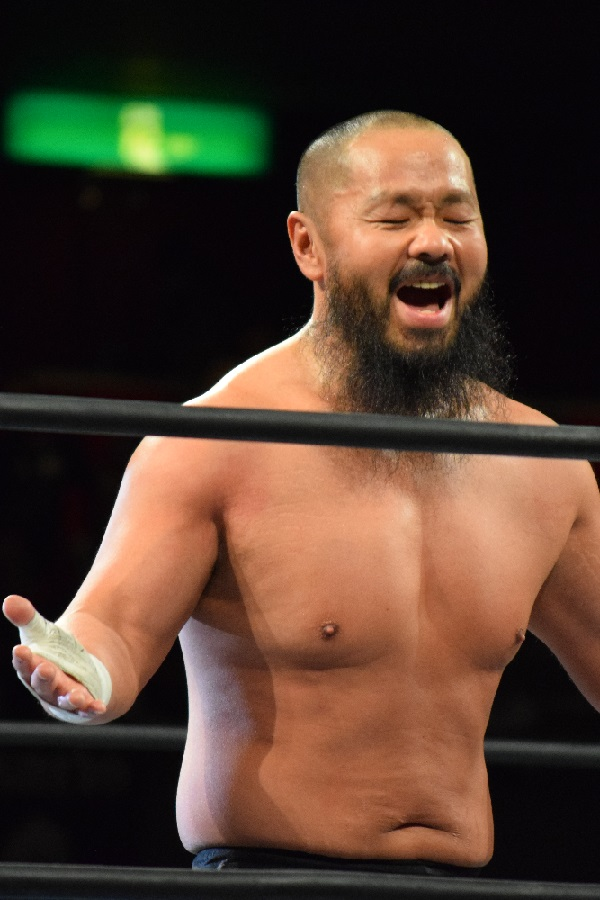 2017年3月12日 ベイコム総合体育館「NEW JAPAN CUP 2017」 外道